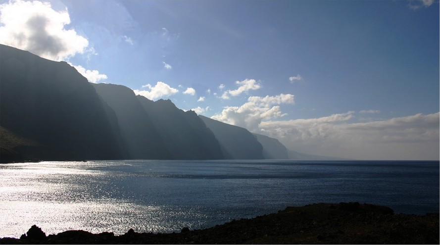 Zona Oeste de Tenerife.